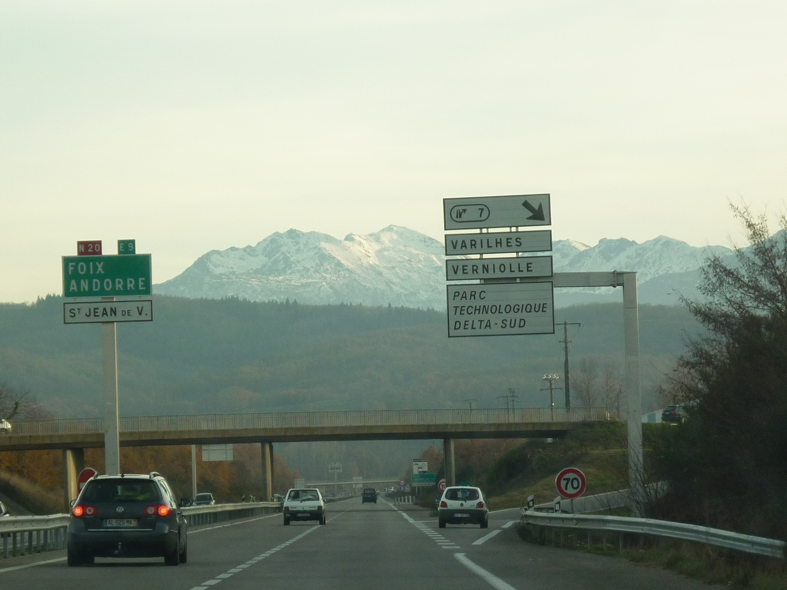 Route Nationale 20 en Ariège près de Varilhes (Ariège, France).